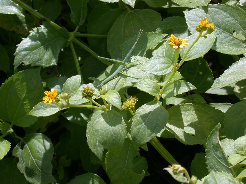 Melanthera biflora：キダチハマグルマ 2006/08/11 沖縄本島：Okinawa Island, Japan